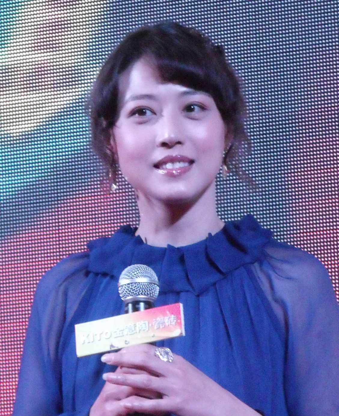 周海媚在沈阳市铁西区红星美凯龙参加商业活动。